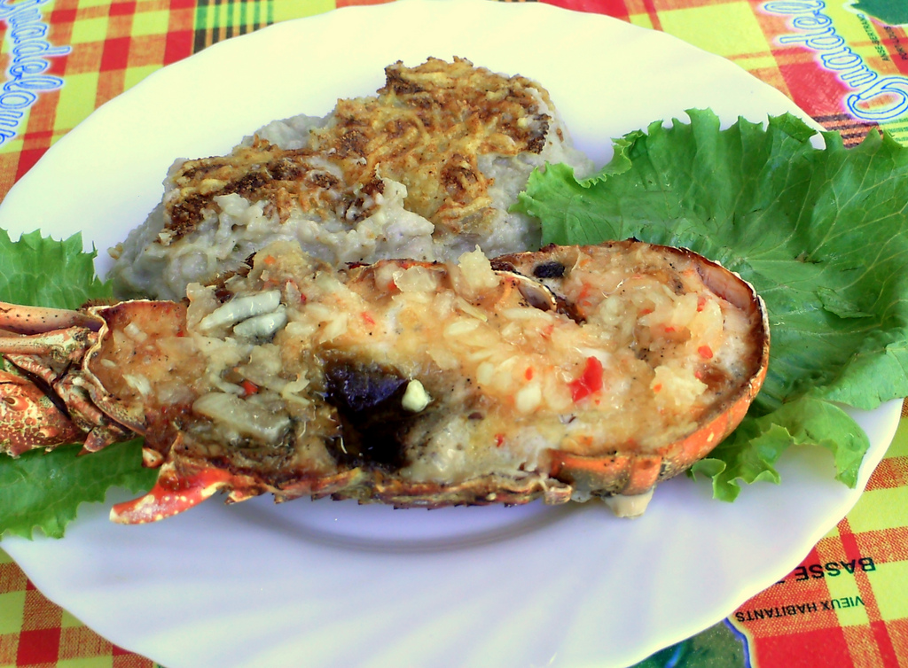 Gratin de bananes accompagné de langouste